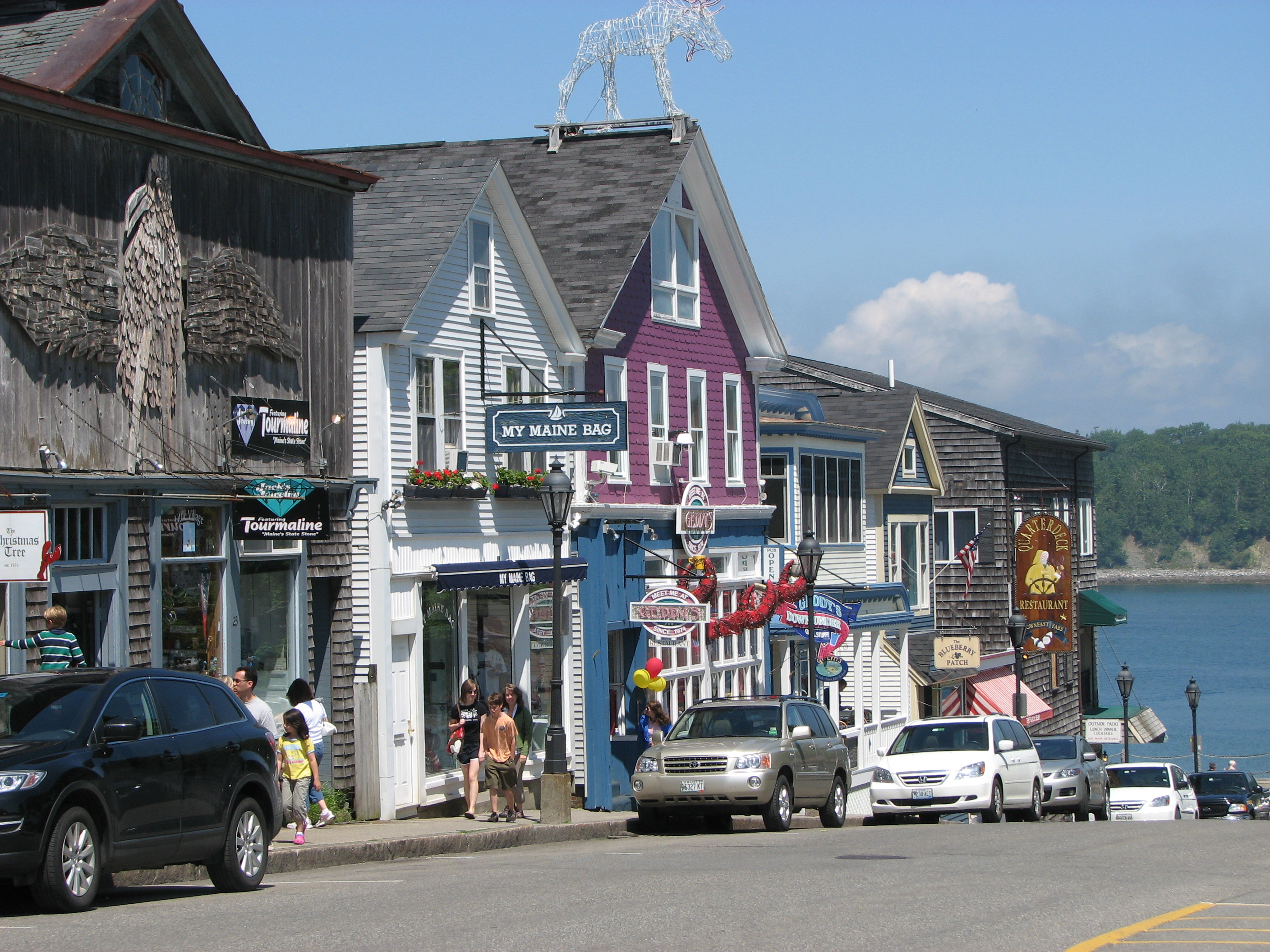 Rue principale à Bar Harbor (Maine)